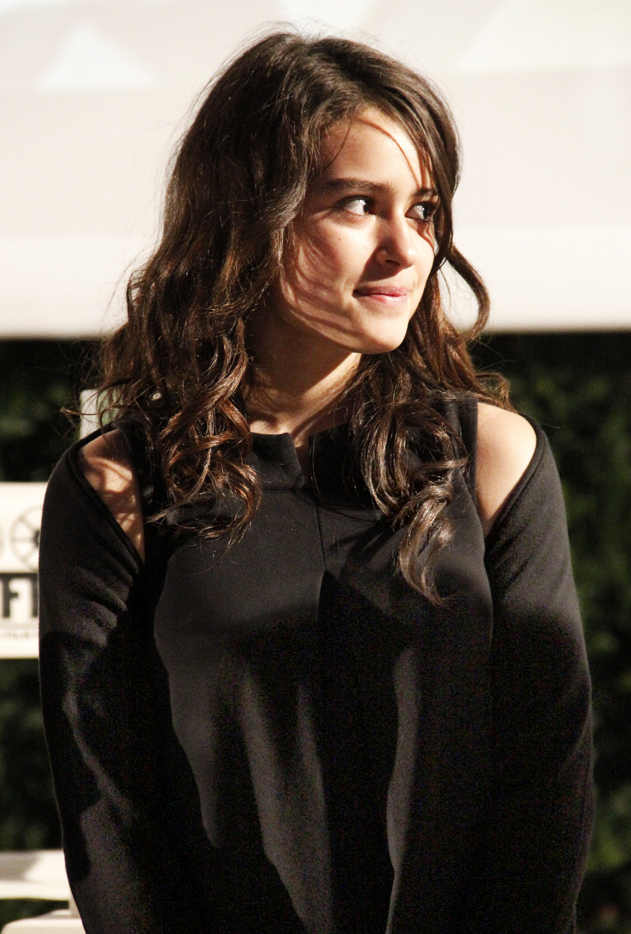 Attrice